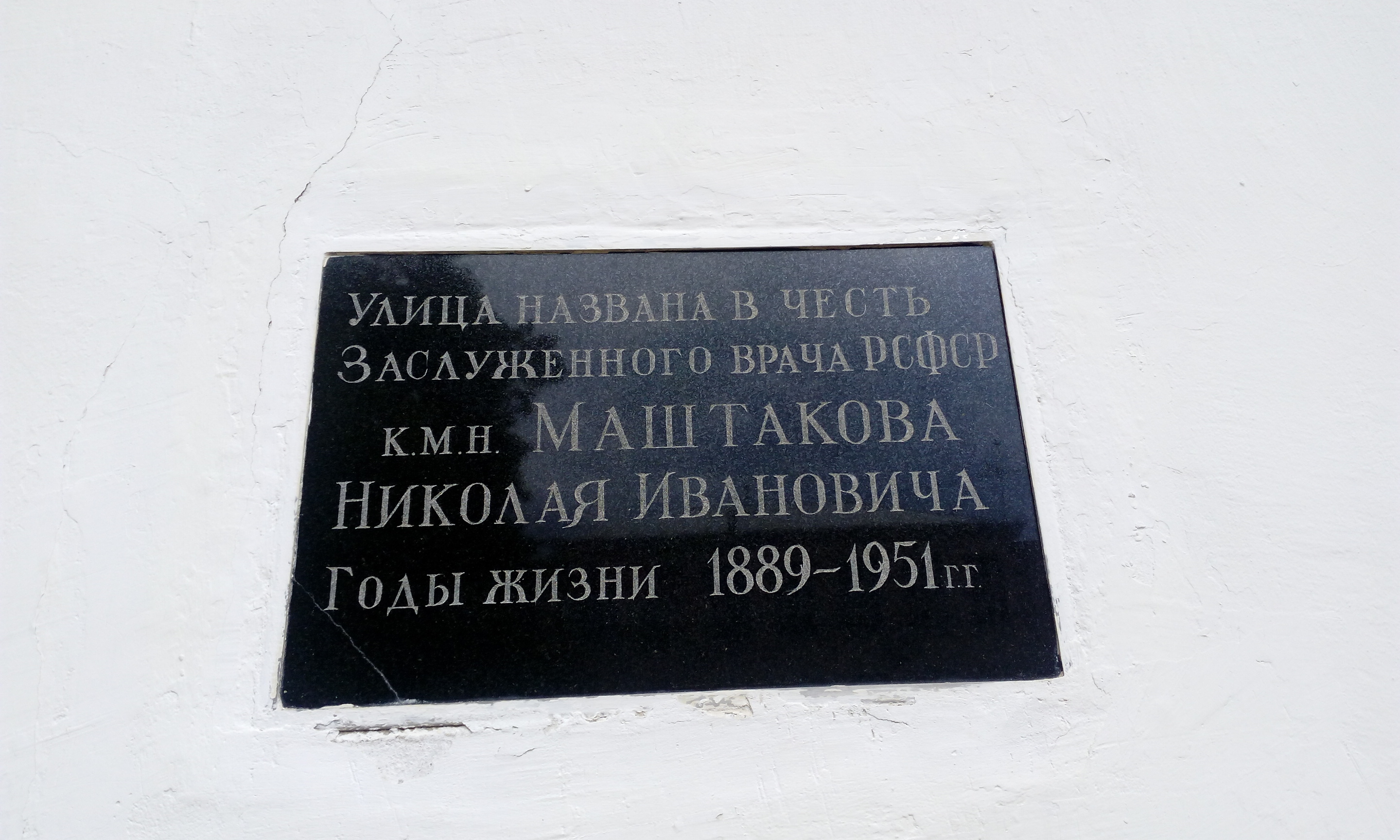 Мемориальная доска на ул. Маштакова